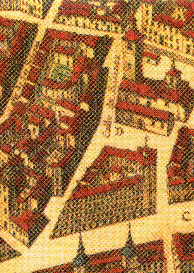 Topografía de la Villa de Madrid descrita por Don Pedro Texeira en 1656, en la cual se demuestran todas las calles al largo y ancho de cada una de ellas, las rinconadas y lo que tuercen las Plazas, fuentes, jardines y huertas con la disposición que tienen las parroquias, Monasterios y Hospitales están señalados sus nombres con letras y números que se hallaran en la tabla y los demás edificios, torres y delanteras de las casas de la parte que mira al Mediodía están sacadas al natural que se podrán tocar las puertas y ventanas de cada una de ellas.